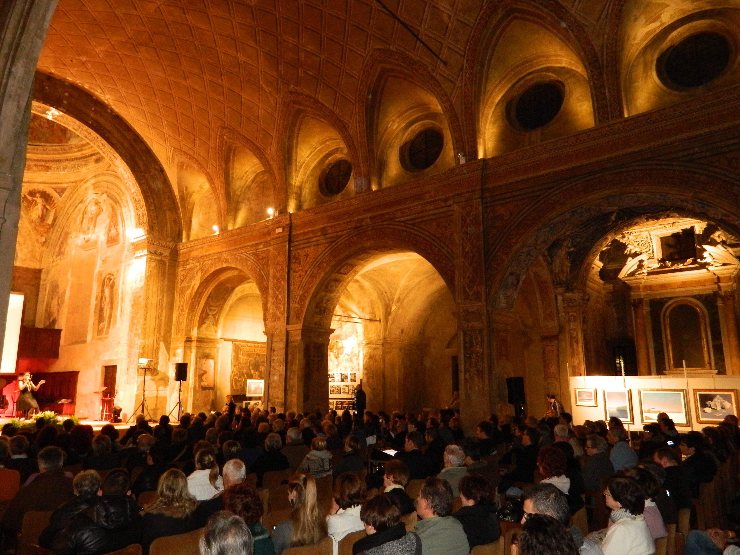 La vecchia Pieve di Palazzolo sull'Oglio; interno durante una manifestazione musicale